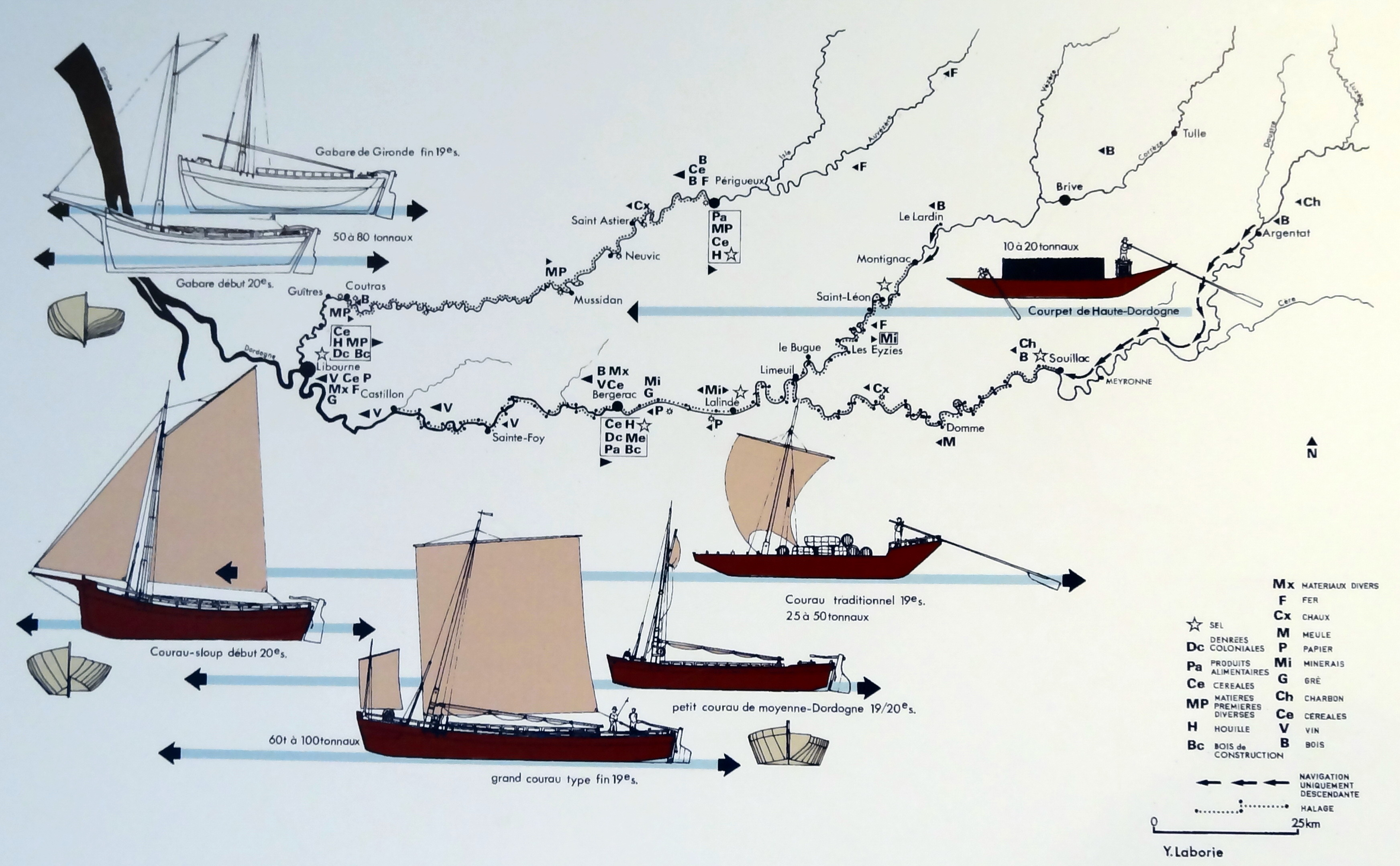 Типы речных судов и перевозимые грузы в районе Бержерака (Дордонь, Франция)